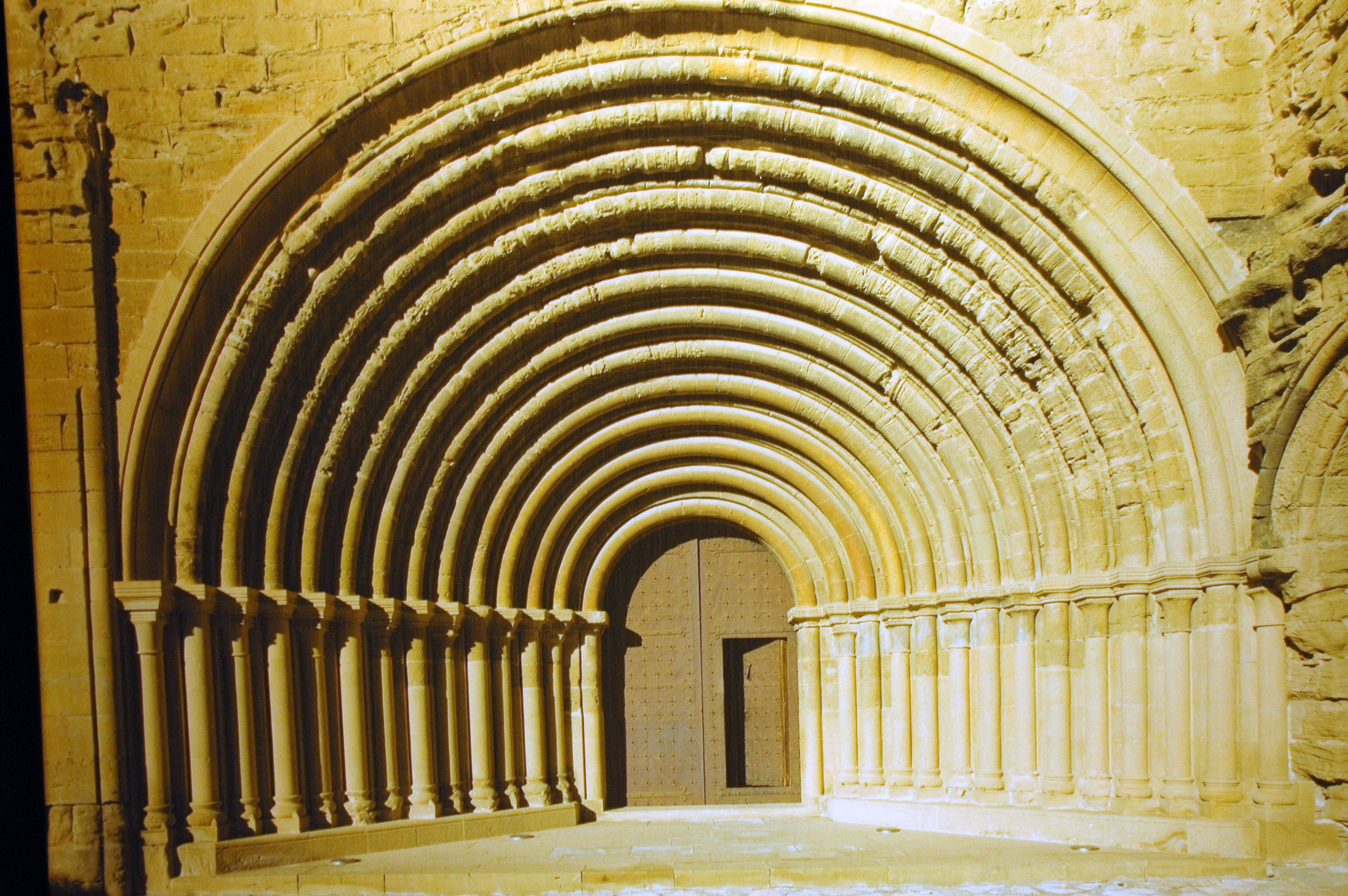 Santa Maria de Sixena